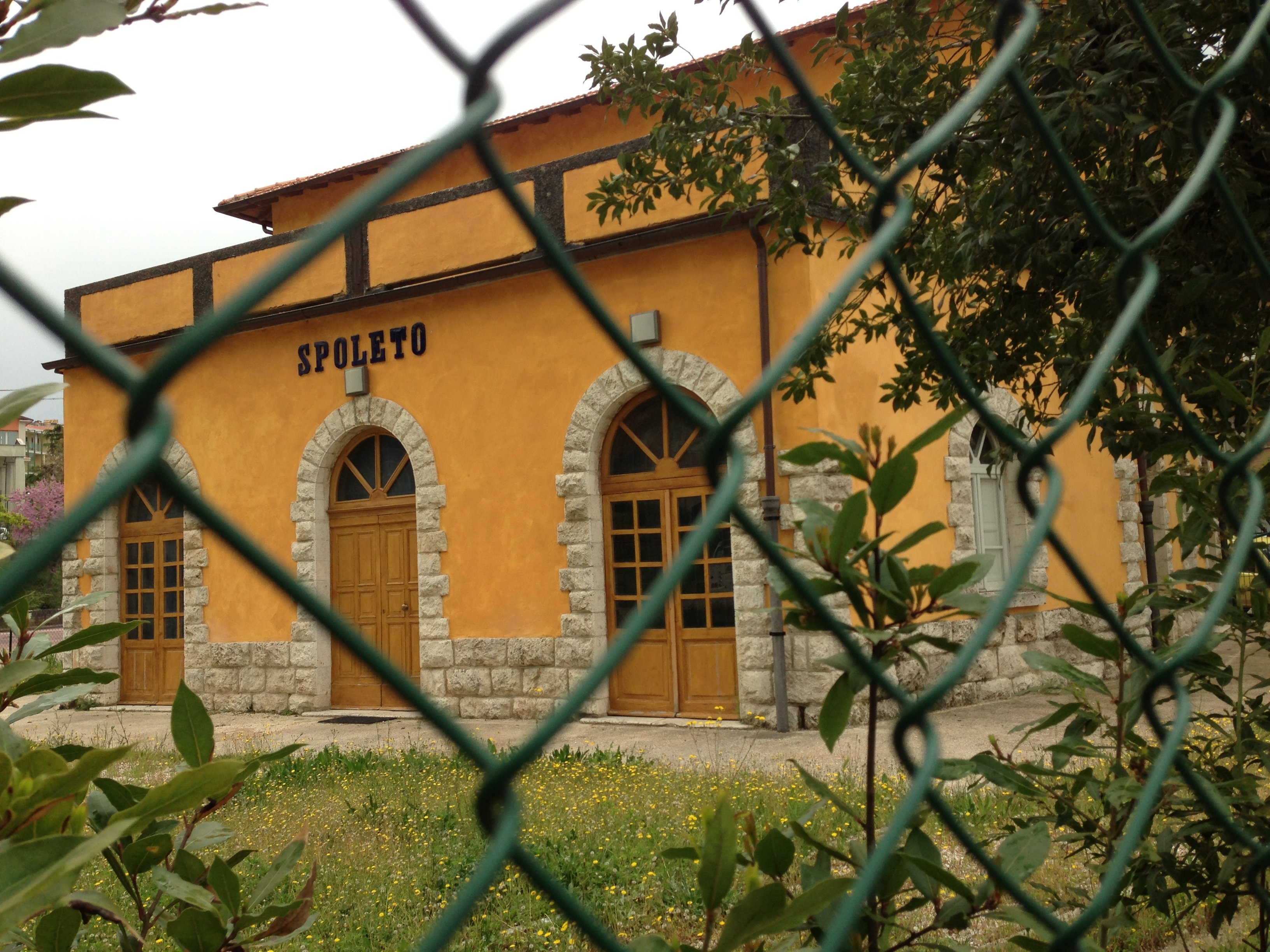 Ferrovia Spoleto-Norcia. Stazione di Spoleto.